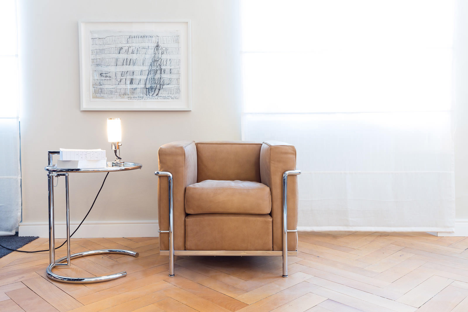 Möbeldesign-Geschichte: Der Sessel LC2 von Le Corbusier, Pierre Jeanneret und Charlotte Perriand (1928). Vertriebsrechte seit 1965 bei Cassina. Sonderauflage des Verband CI (Creative Inneneinrichter) 1978 zum 50jährigen Jubiläum.